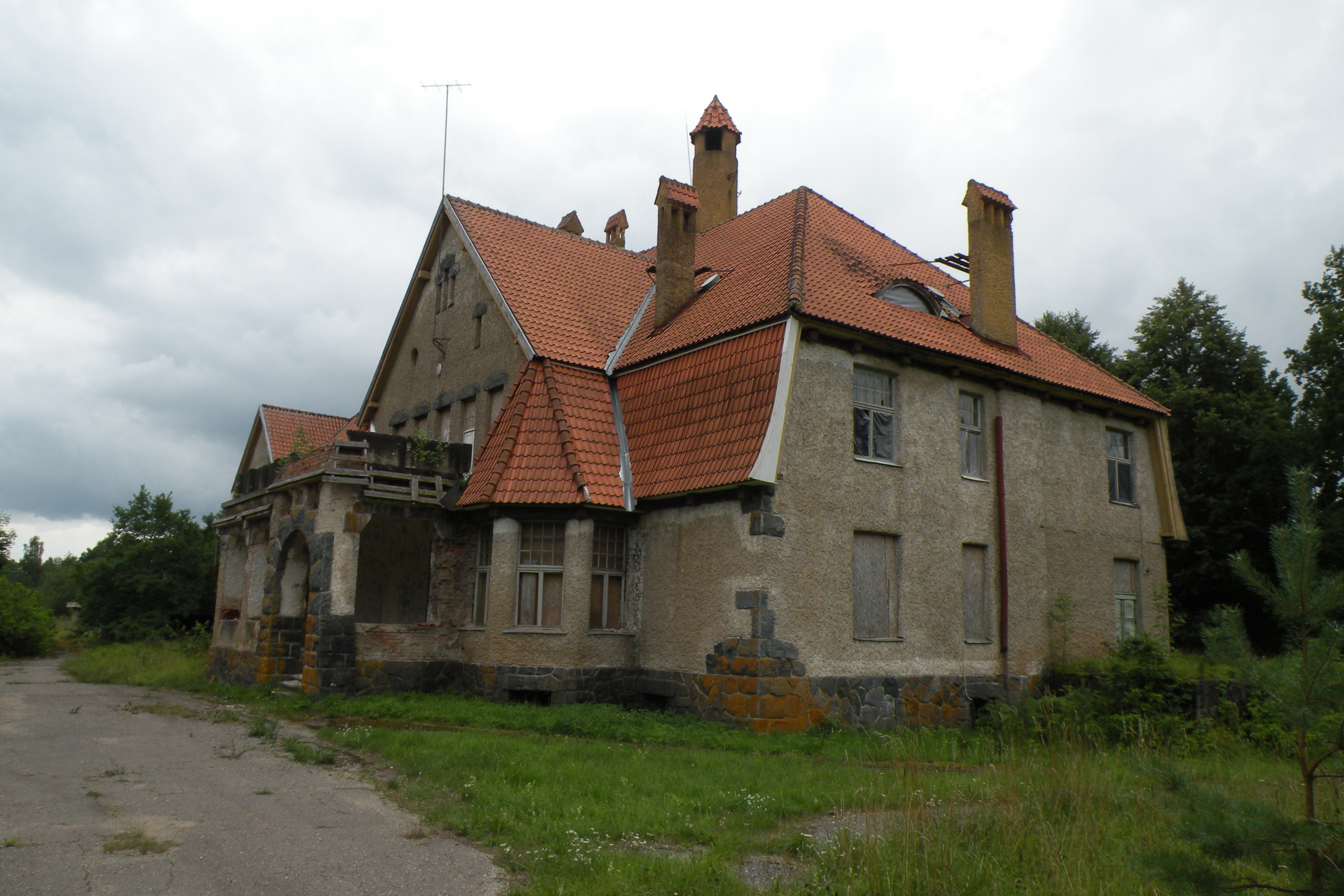 1910. aastal valminud juugendstiilis Holdre härrastemaja arhitektiks oli Berliinis õppinud ja Riias tegutsenud arhitekt Otto Wildau.